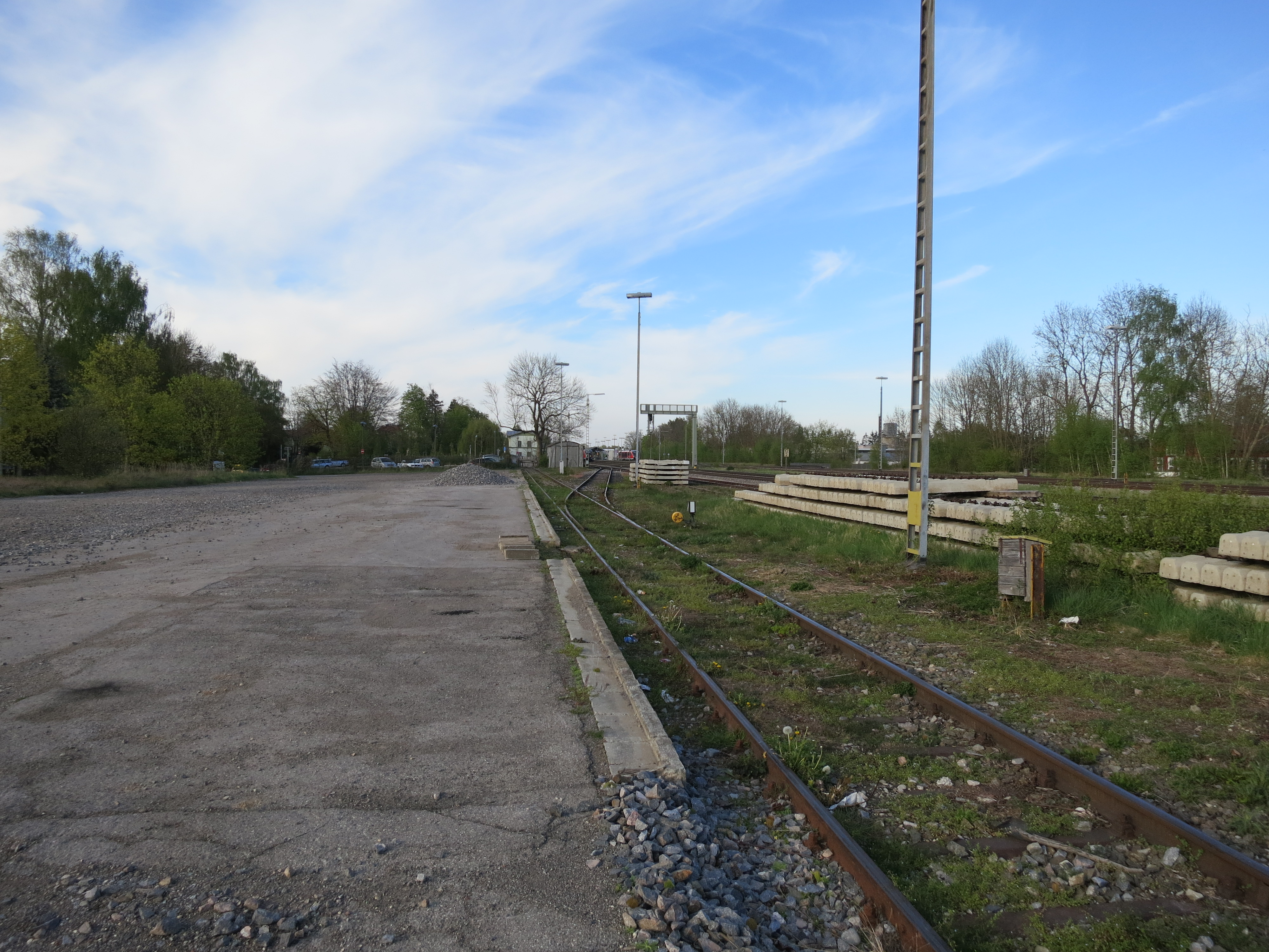 Ladestraße am Bahnhof Bobingen